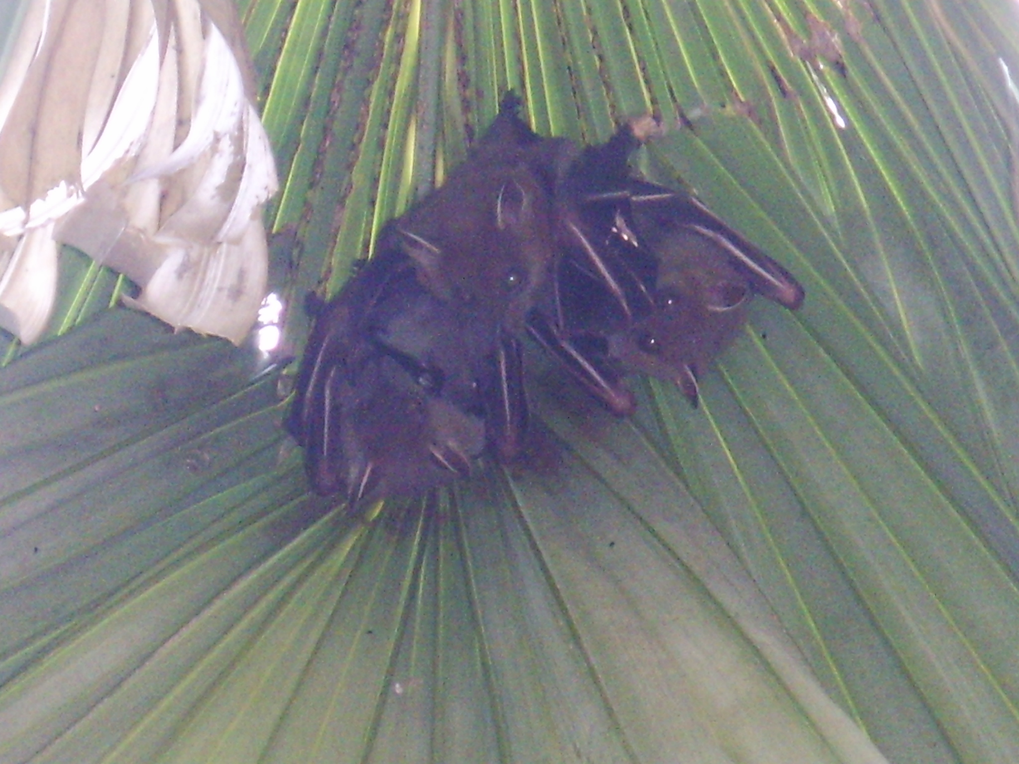 粵語: 短吻果蝠，07年喺粉嶺一棵蒲葵葉下影的！